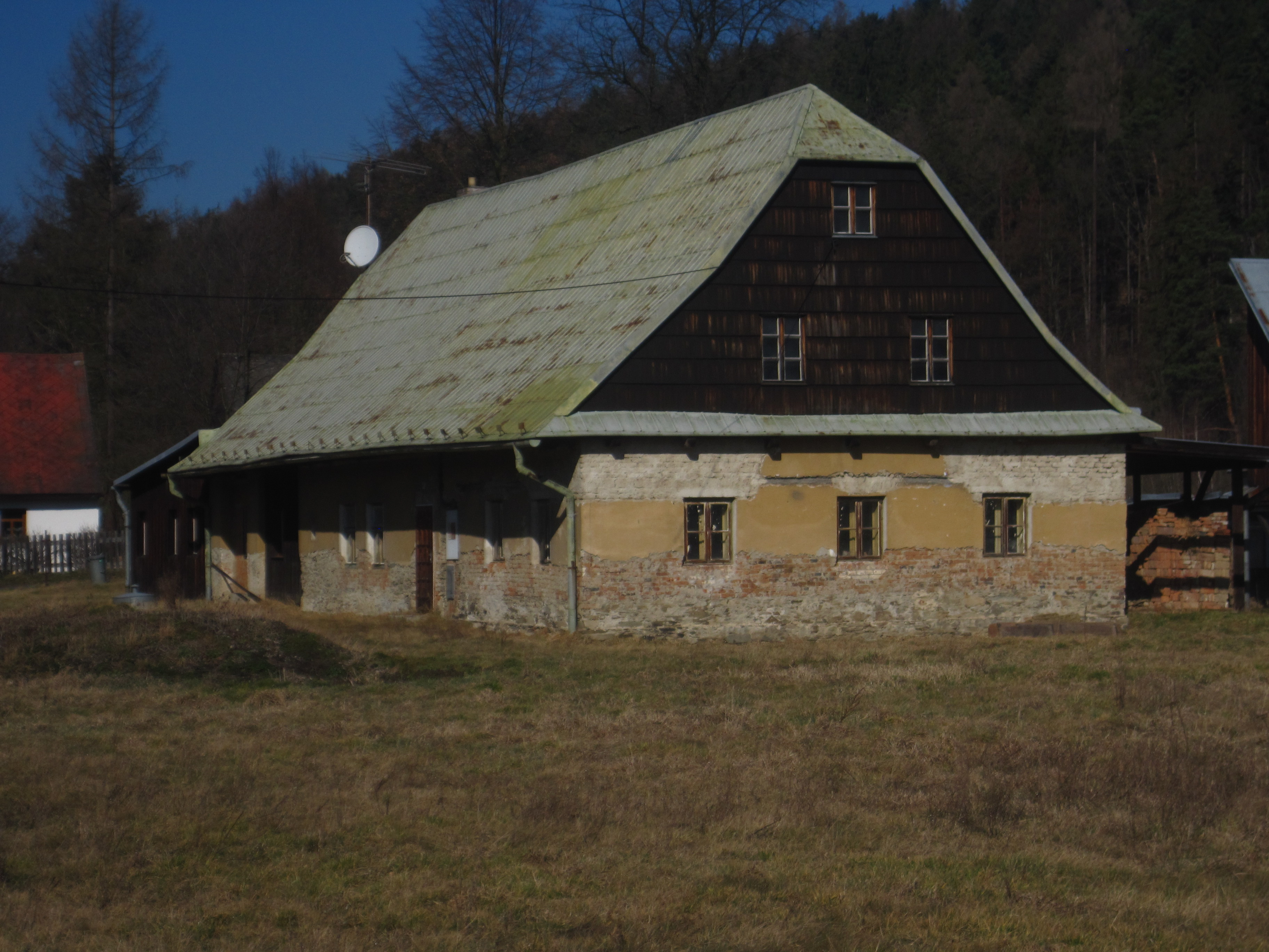 Nové Heřminovy - lidová architektura čp. 48